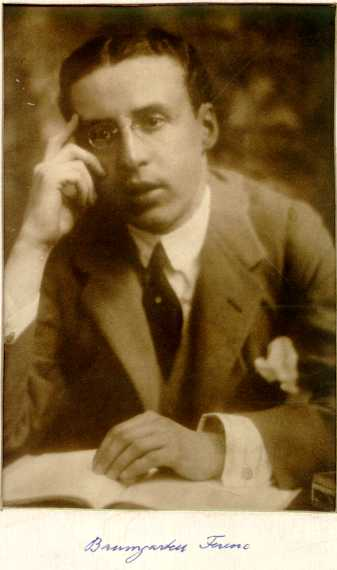 Baumgarten Ferenc Ferdinánd (Budapest, 1880. november 6. – Ótátrafüred, 1927. január 18.) magyar esztéta, műkritikus.